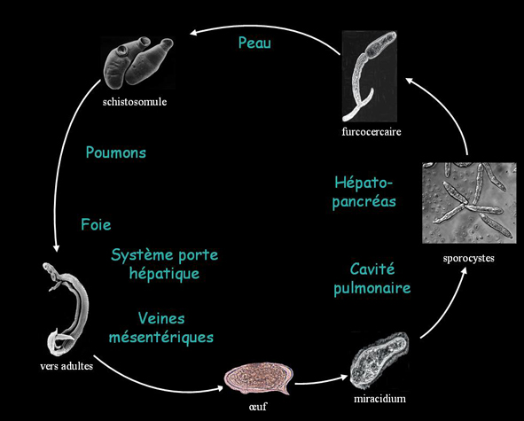 Cycle de vie du schistosome Image perso